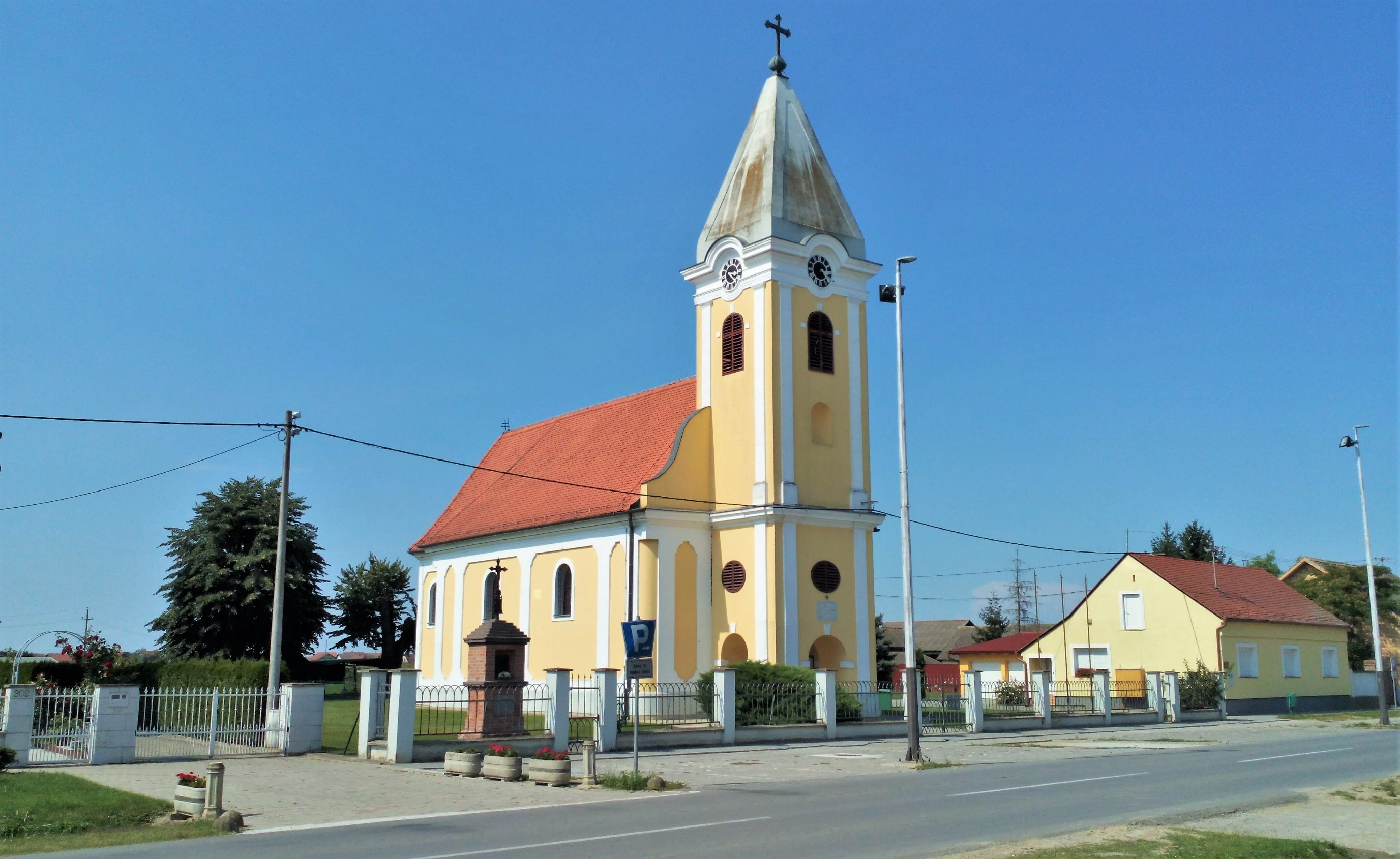 Crkva Presvetog Trojstva u Čepinu.